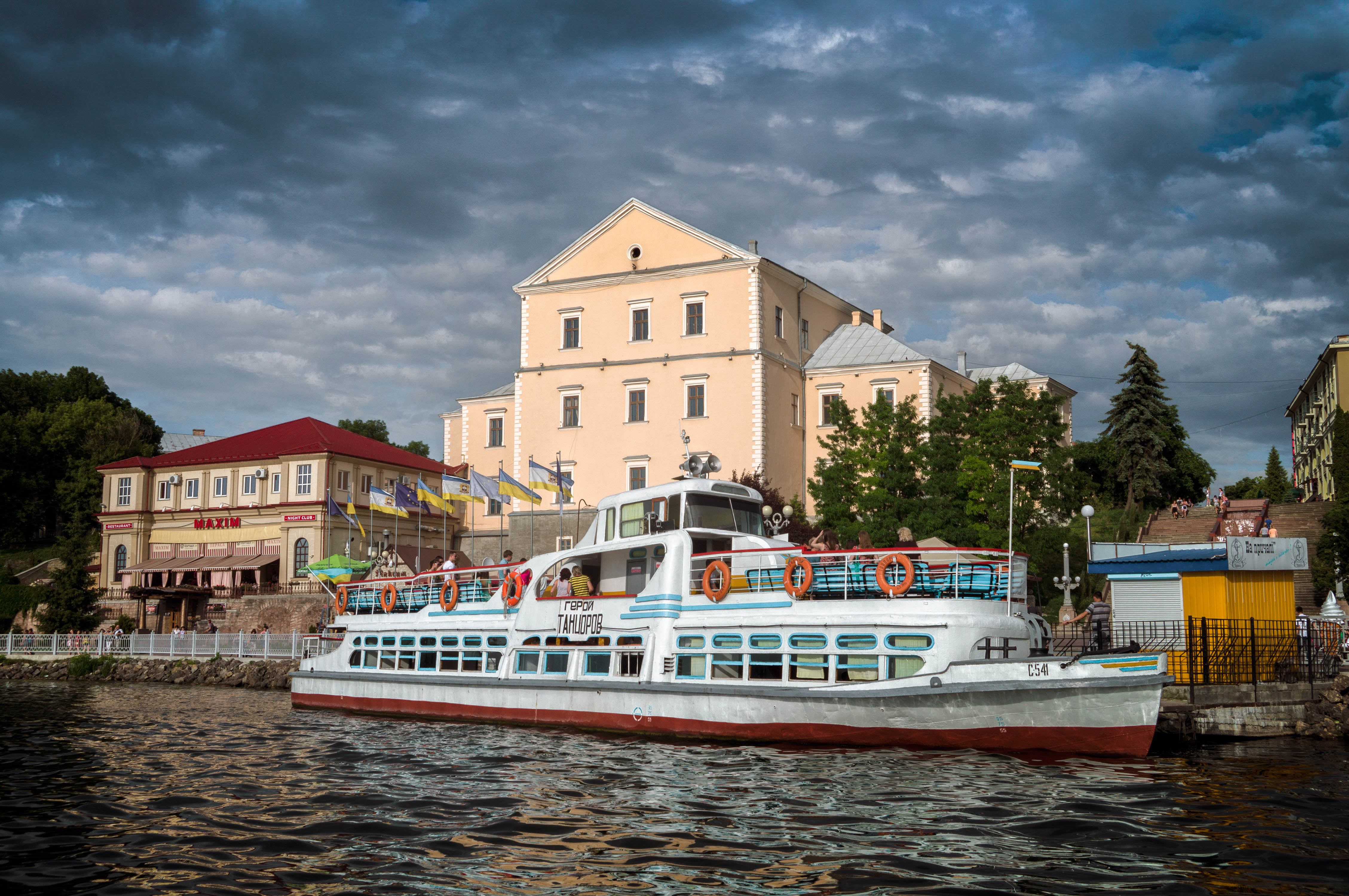 Тернопіль. Теплохід і замок.